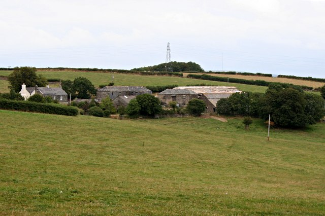 Bodbrane Farm